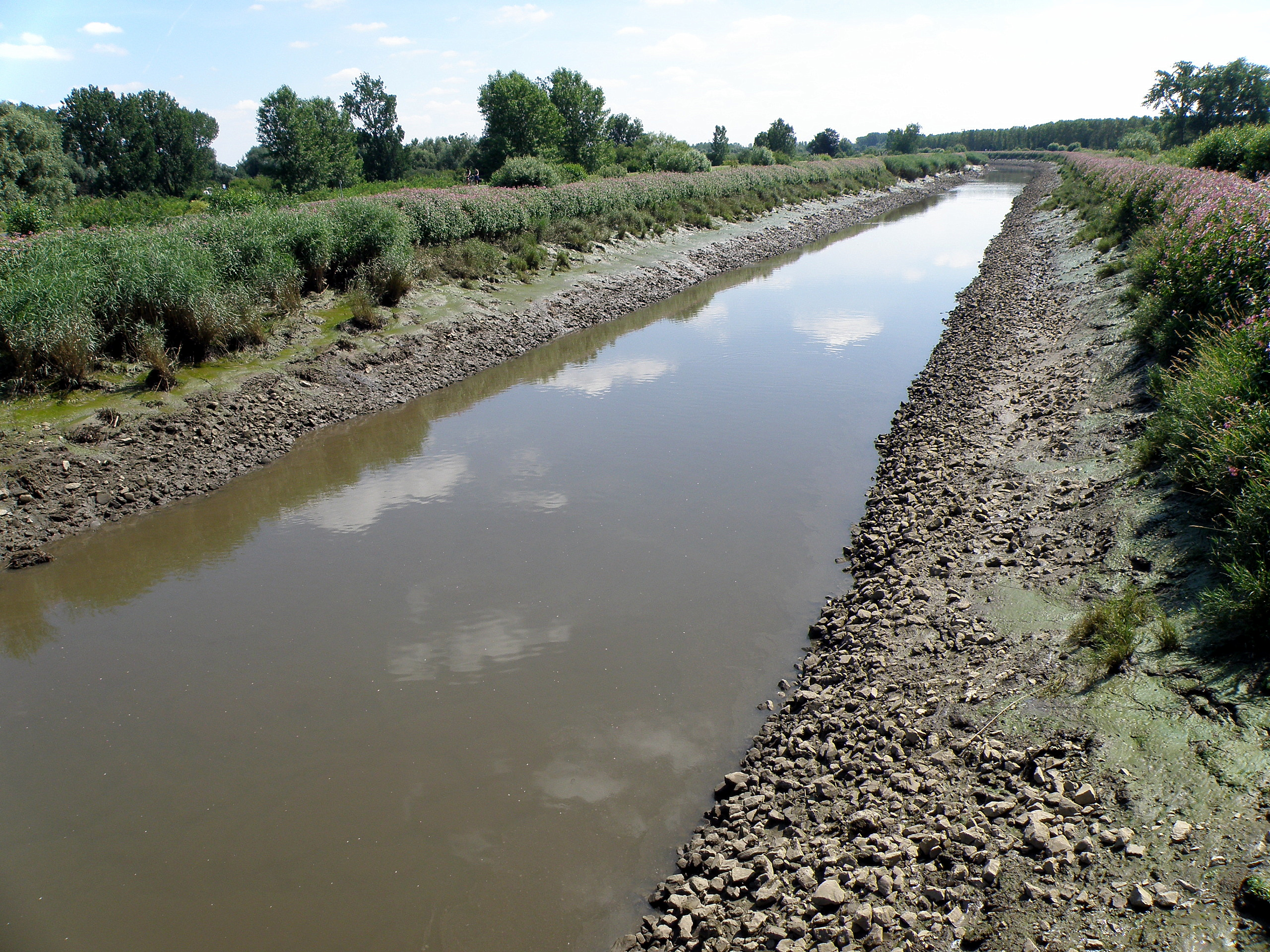 Battel (gem. Mechelen). Gekanaliseerde Zenne te Battel (Mechelen), nabij het Zennegat. Blikrichting zuid.